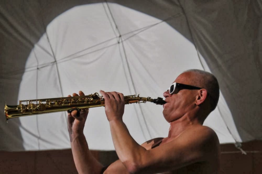 Grencsó István magyar dzsessz zenész (szaxofon, fuvola).